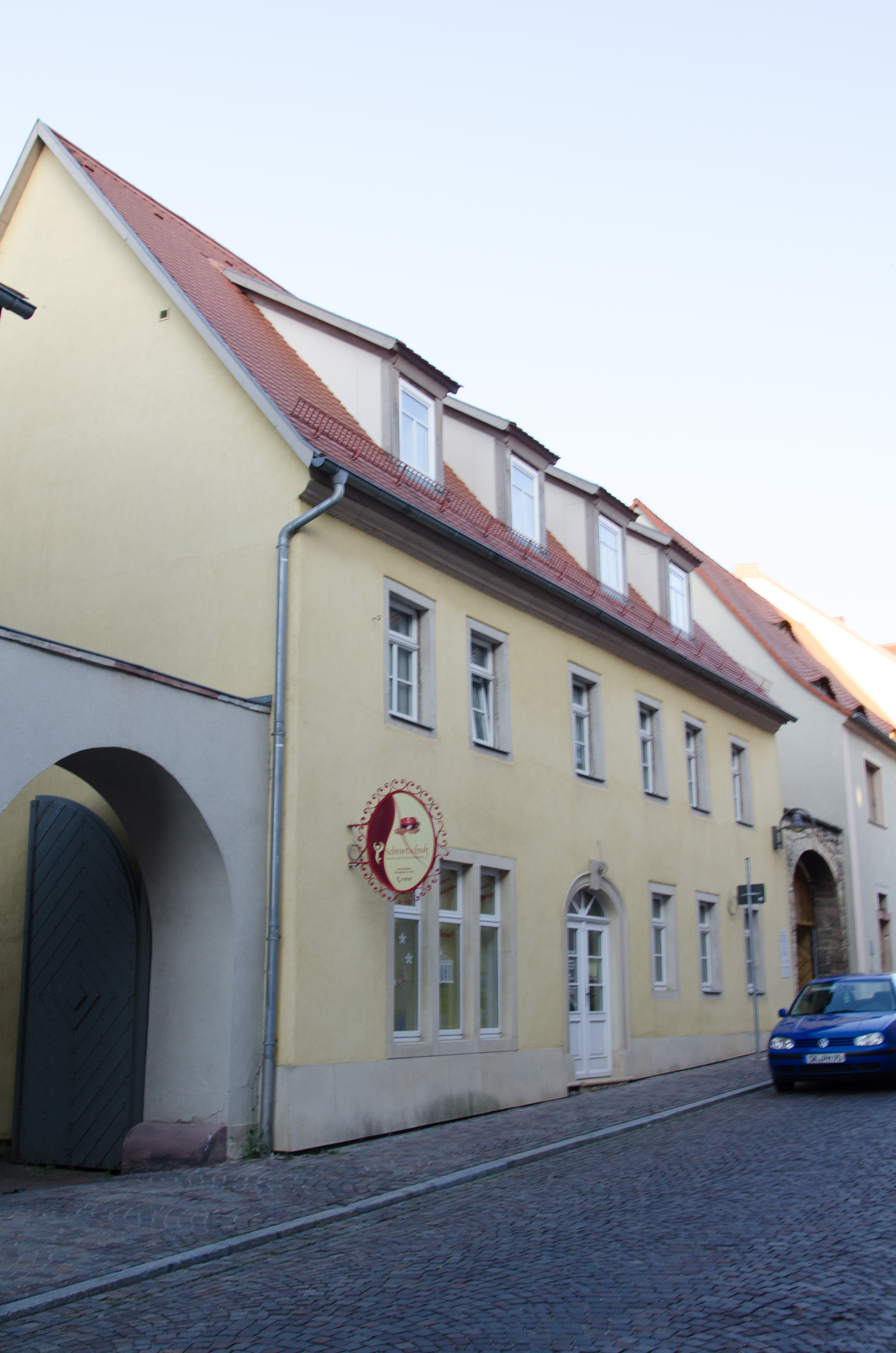 Querfurt, Nebraer Straße 13